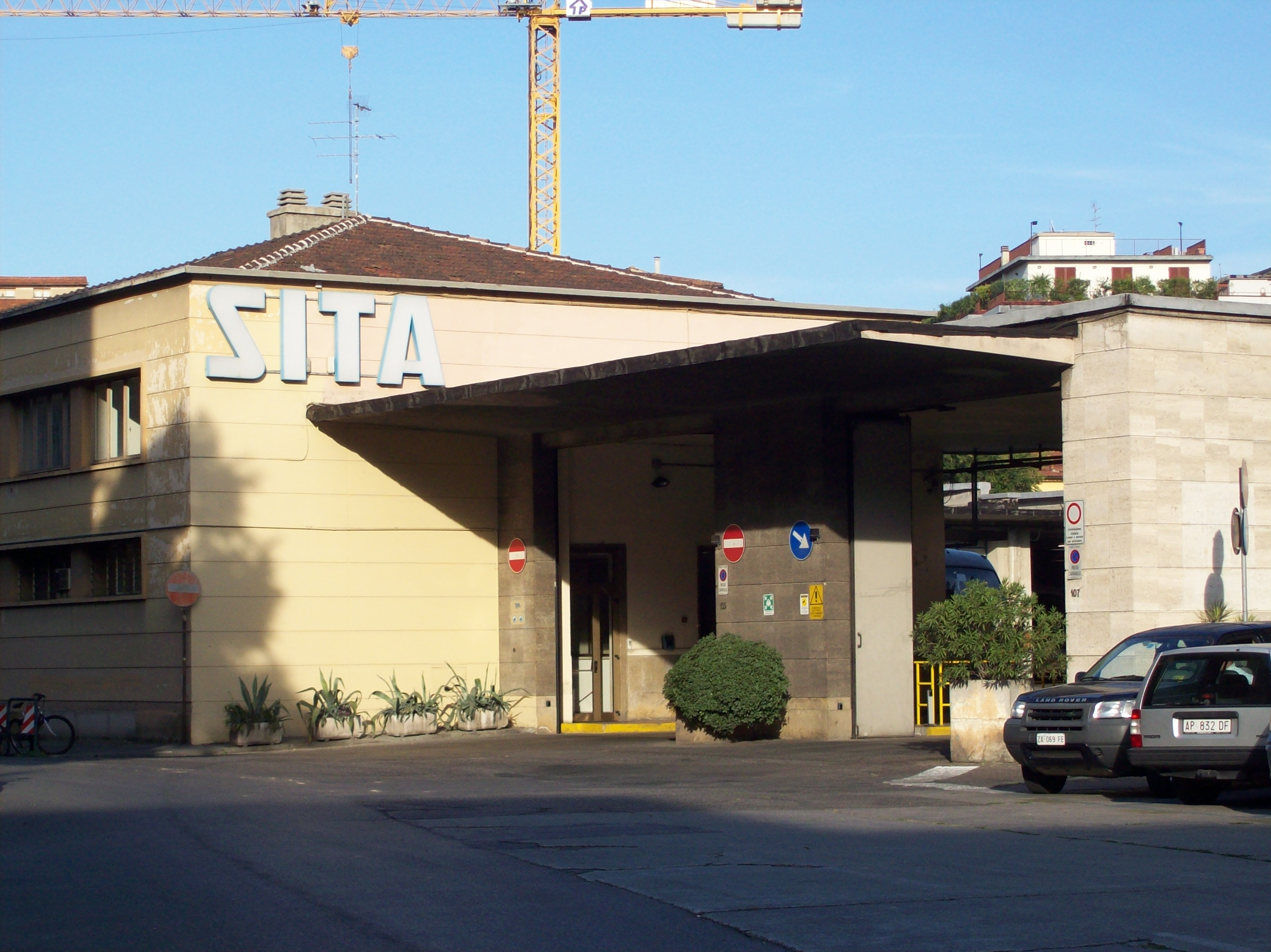 autoistazione sita